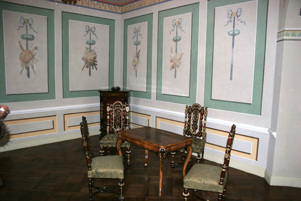 Dobrzyca. Dekoracje iluzjonistyczne